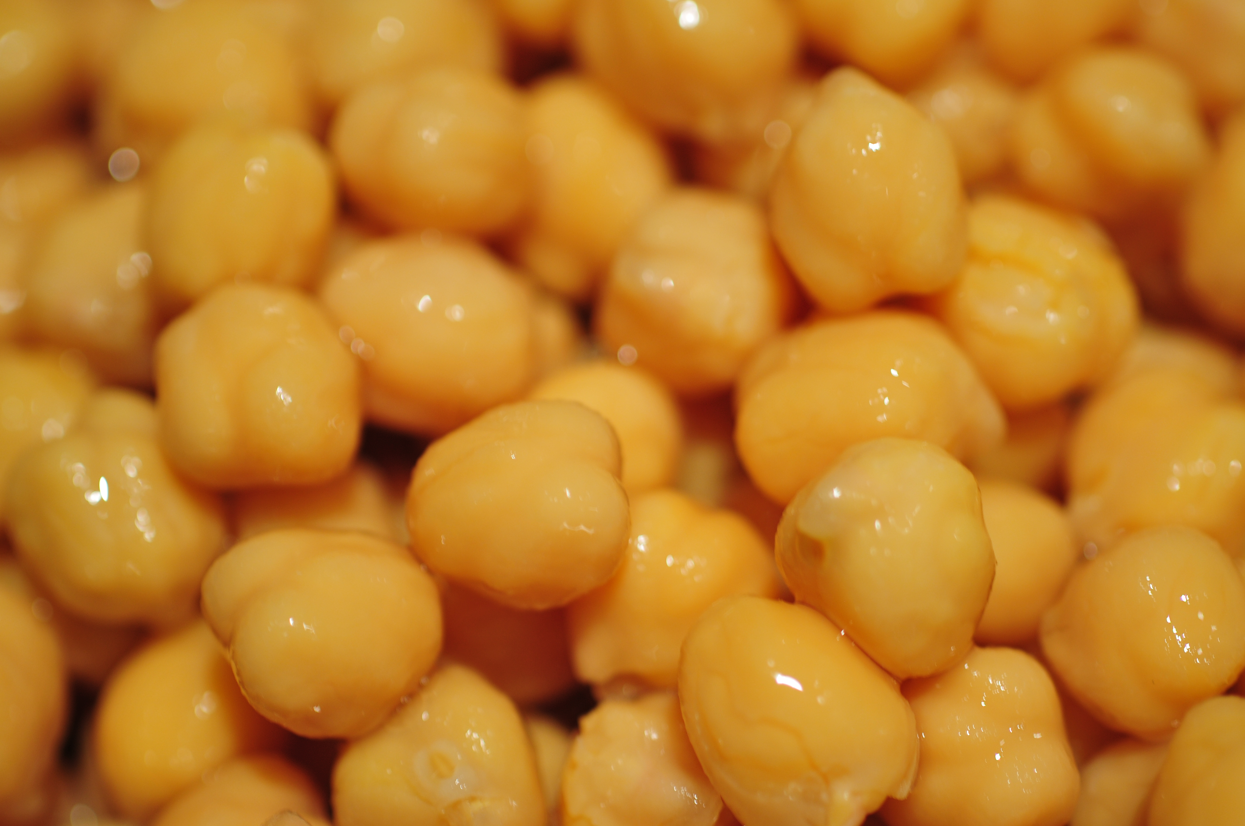 Zubereitung von Kichererbsensalat, Beitrag für Wikibooks ins Sieb ausschütten